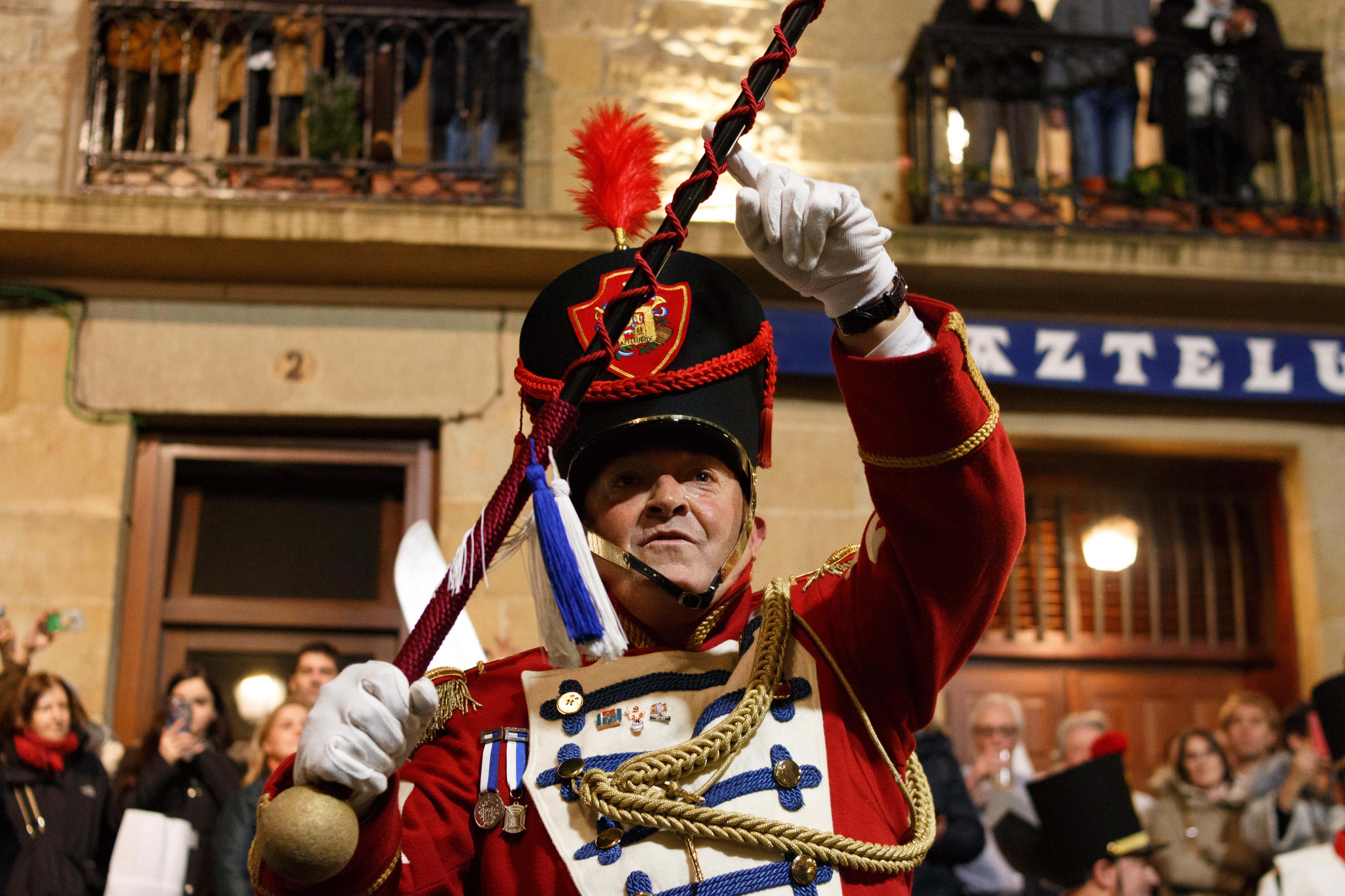 Donostiako danborrada This is a photography of a Folklore festival in Spain (Wikidata id Q2613306).